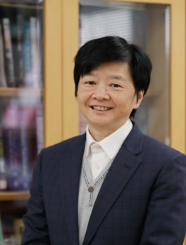 日本を代表するウイルス学者の甲斐知惠子。